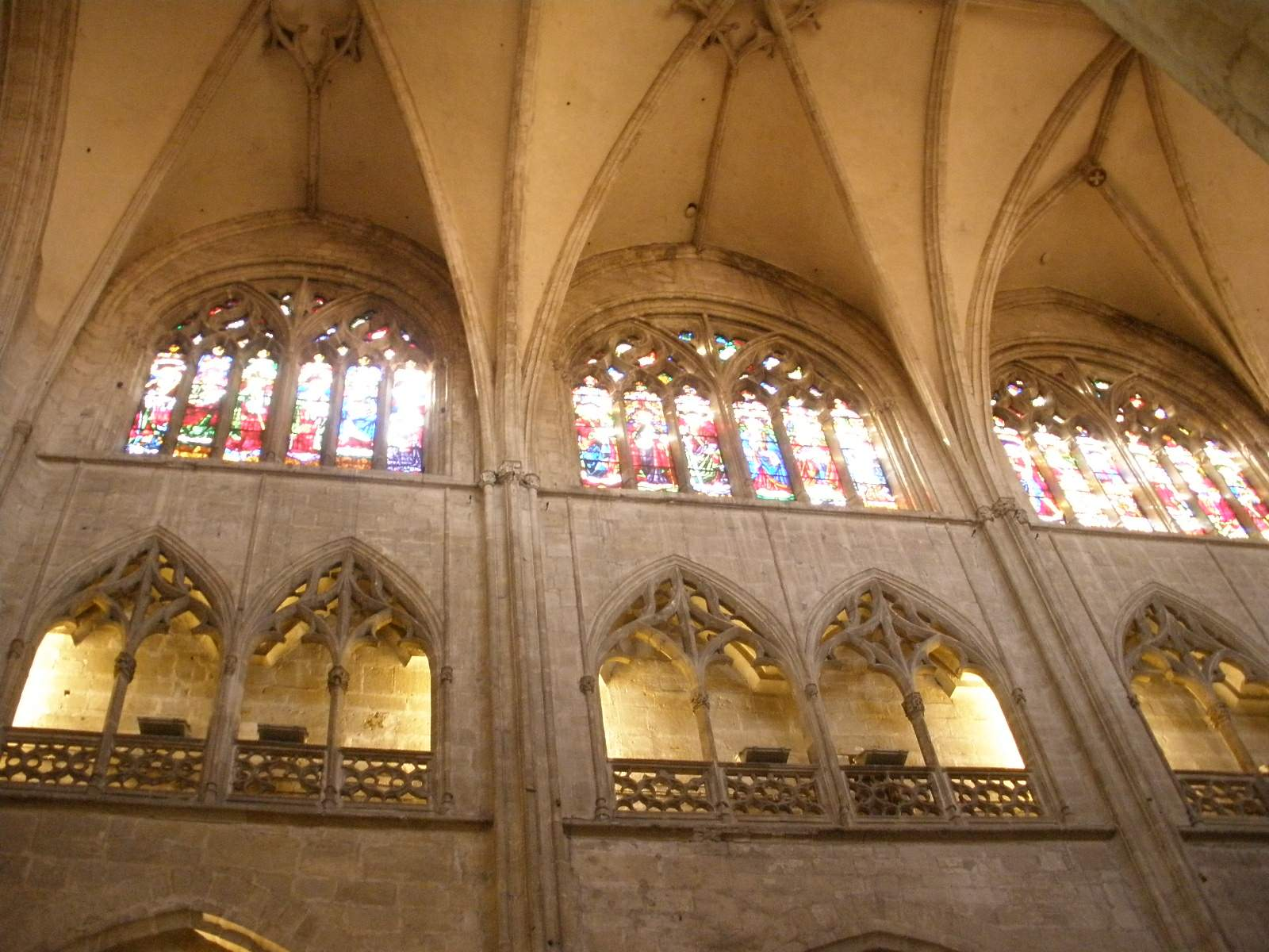 Catedral de Oviedo